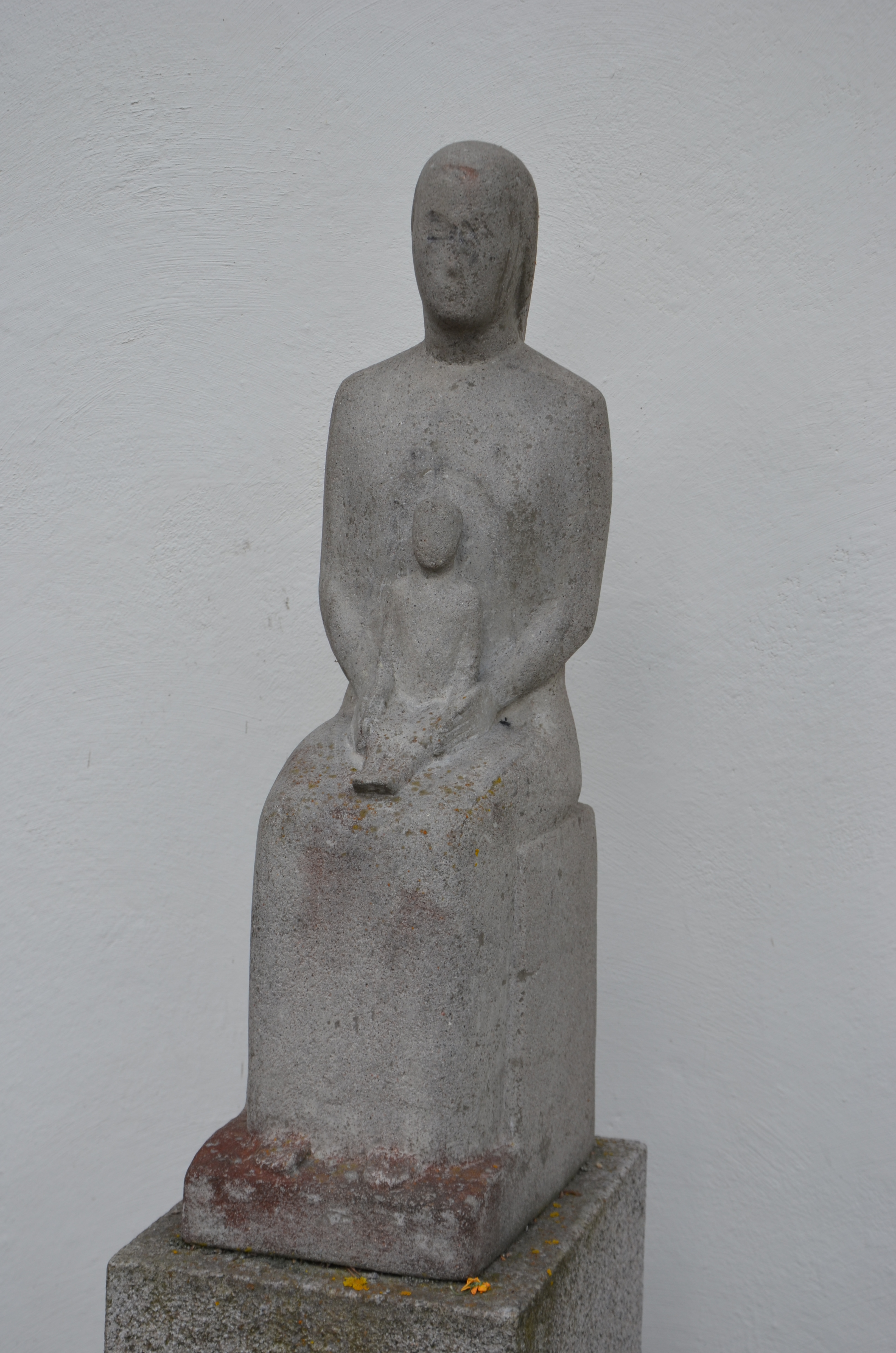 Kajsa Mattas' Maria och barnet, Sköndals kyrka, Stockholm